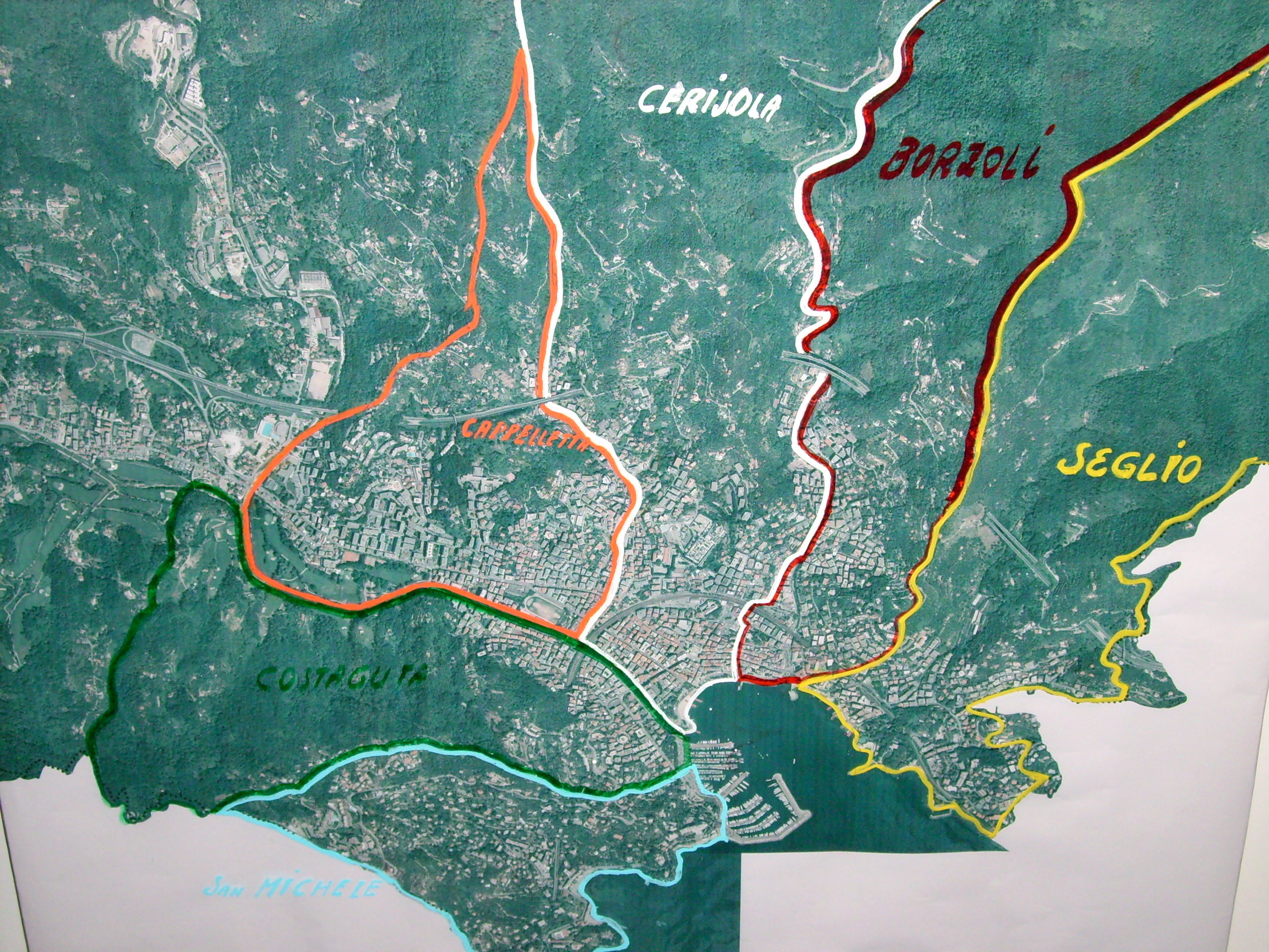 Divisione degli antichi sestieri della Città di Rapallo, Liguria, Italia